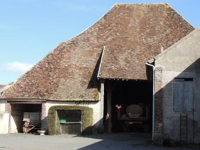 Grange dîmière de Malesherbes à Montigny le Guédier avec un grand toit à faitage central très court et donc à pentes d'environs 45° avec différentiel pour la grande "porte" où il est moins pentu et pour le reste du batiment où il court jusqu'aux murs d'à peine plus d'1 m de haut. Les arretes de ce grand toit ne sont pas rectilignes Un autre profil de batiment sur la droite cache la partie droite de la grande "porte"